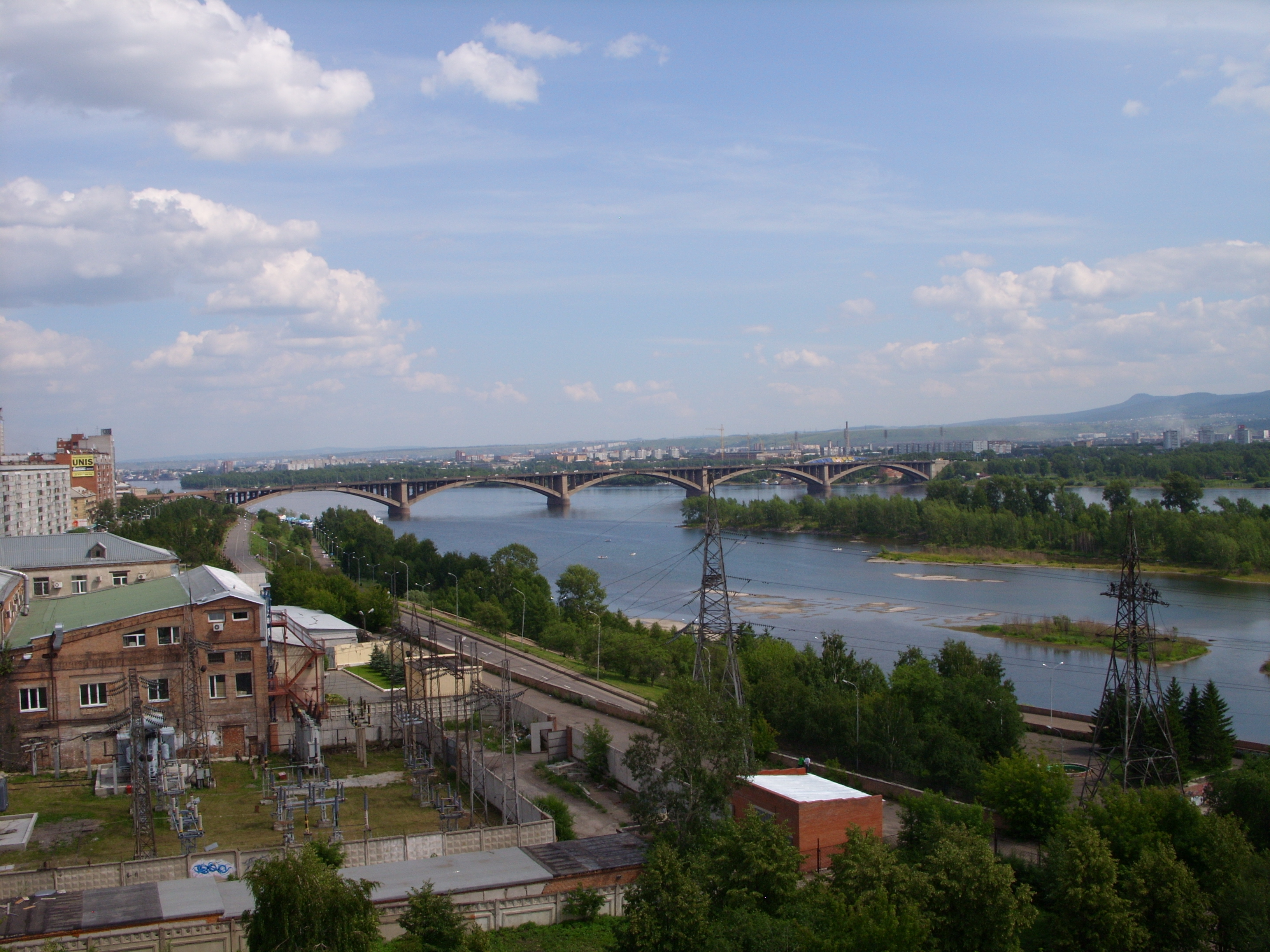 снимки июля 2008 г.